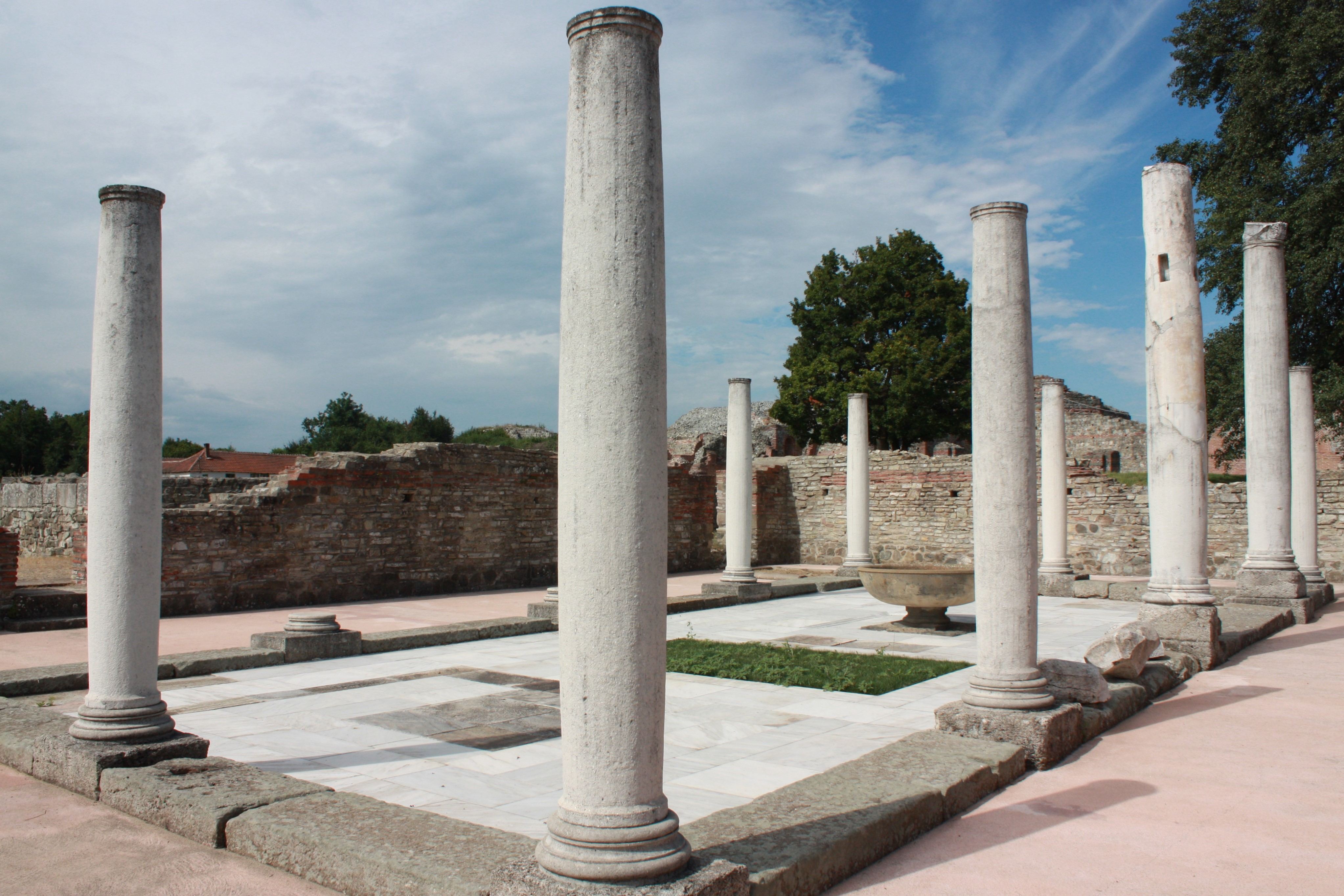 Atrium med fontene i Gamzigrad